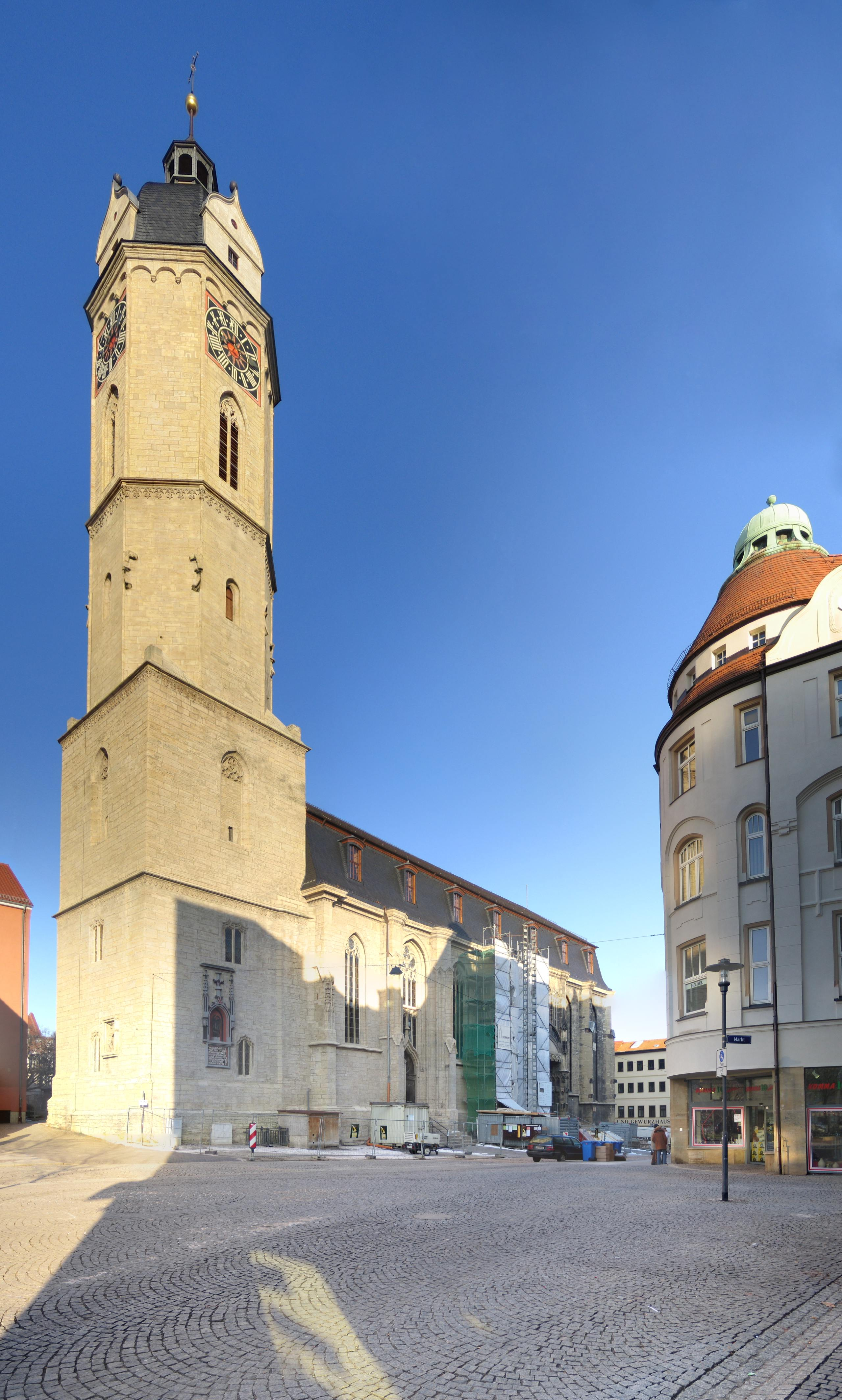 Kirche St. Michaelis in der Jenaer Innenstadt